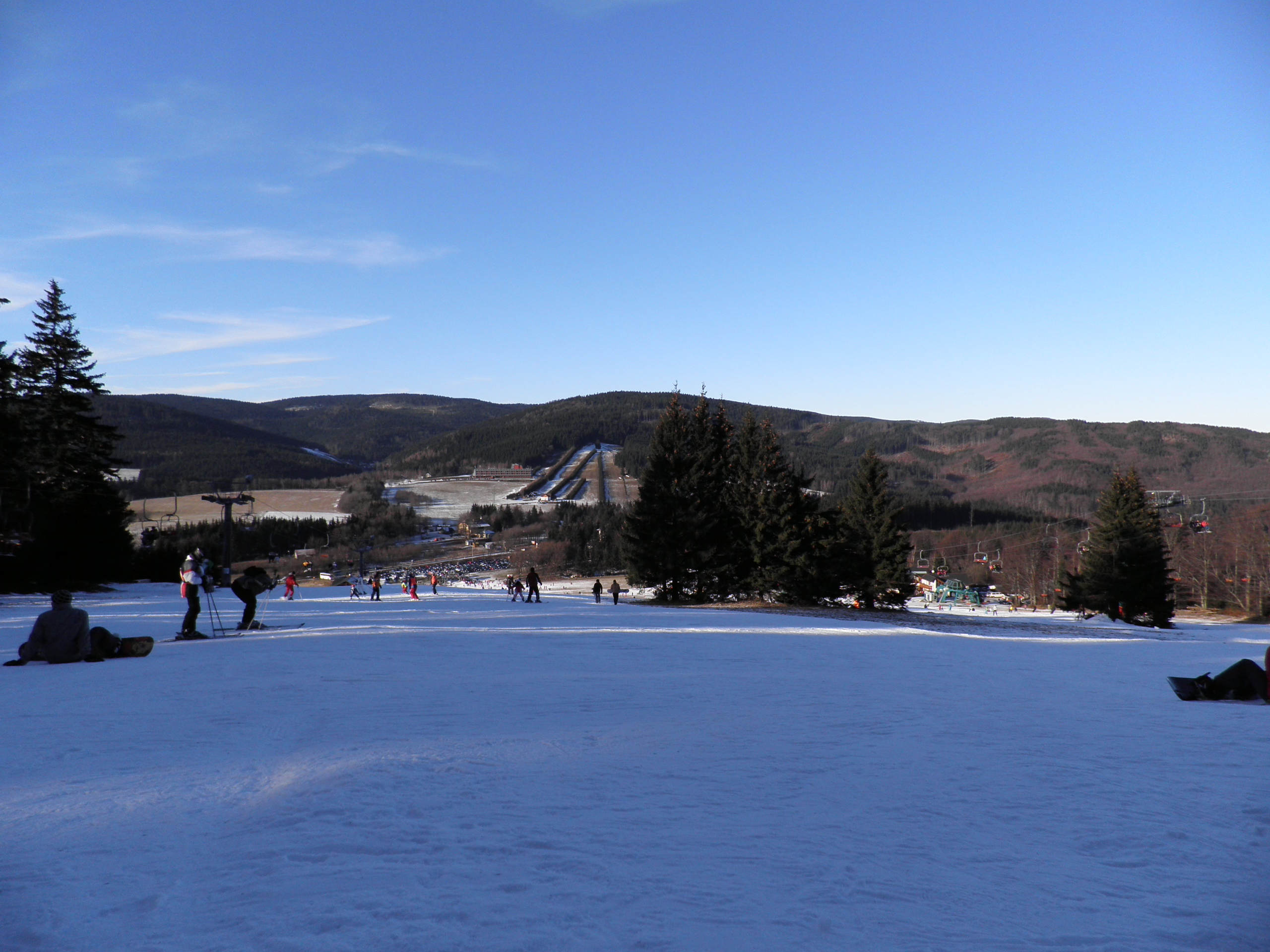 Ramzova ski areal